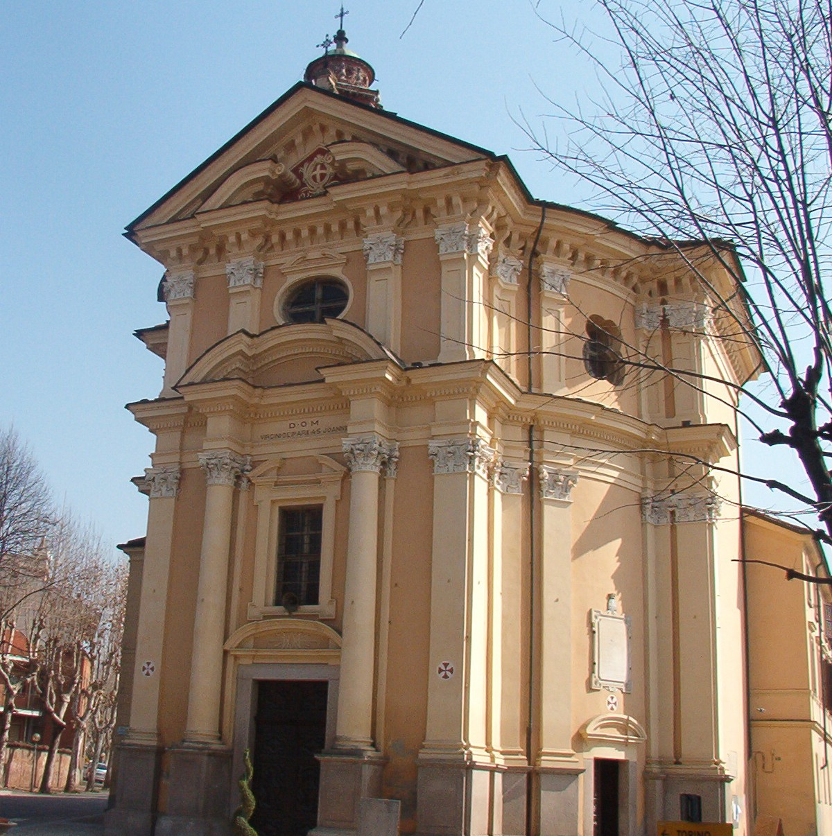 santuario Beata Vergine - Sommariva del Bosco - Provincia di Cuneo - Piemonte - Italia